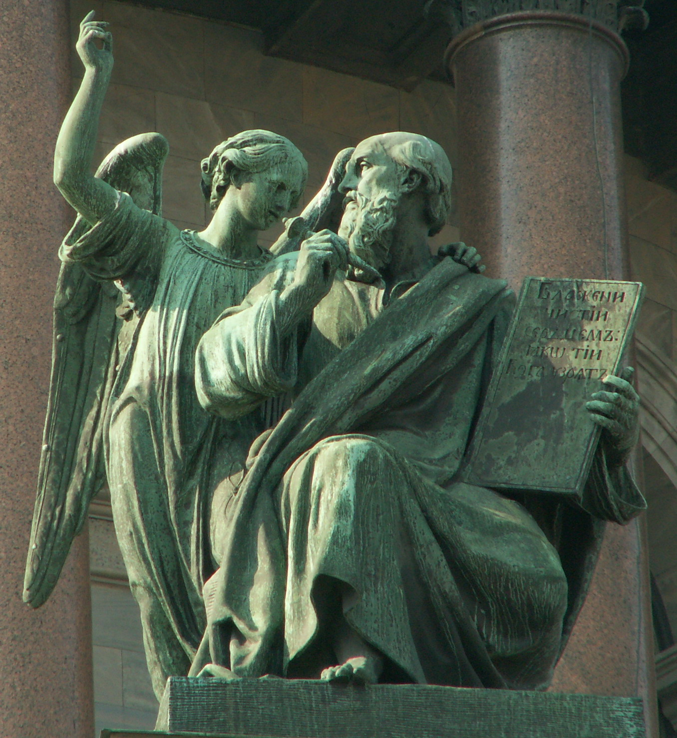 Statue of Apostle Matthew on Saint Isaac's cathedral. Saint Petersburg, Russia Статуя Апостола Матвея на Исаакиевском соборе. Санкт-Петербург. Россия.